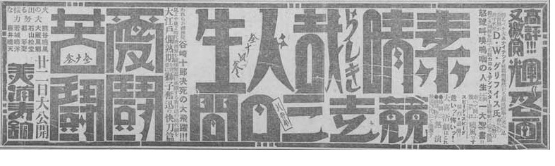 北海タイムス、1927年（昭和2年）4月22日、第2面の一部、美満壽館広告